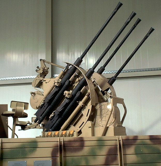 2 cm MK Flak-Vierling auf Zugkraftwagen 8 t (Sd.Kfz.7/1) / aufgenommen in der Wehrtechnischen Studiensammlung Koblenz